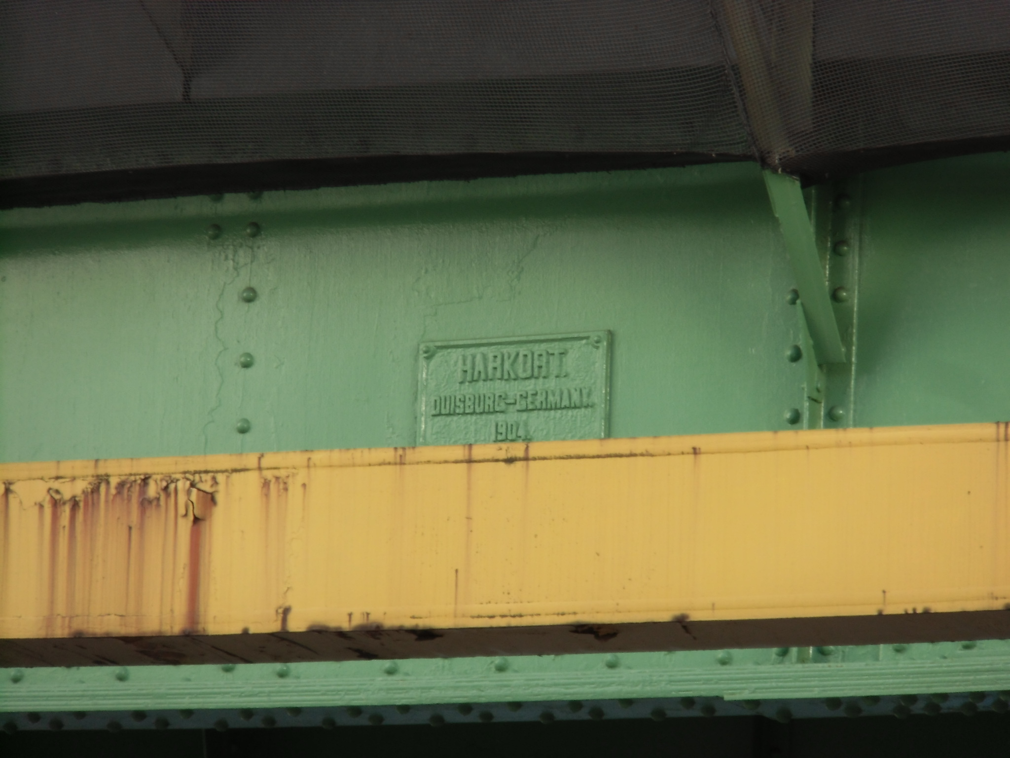 昌平橋架道橋の製造銘板